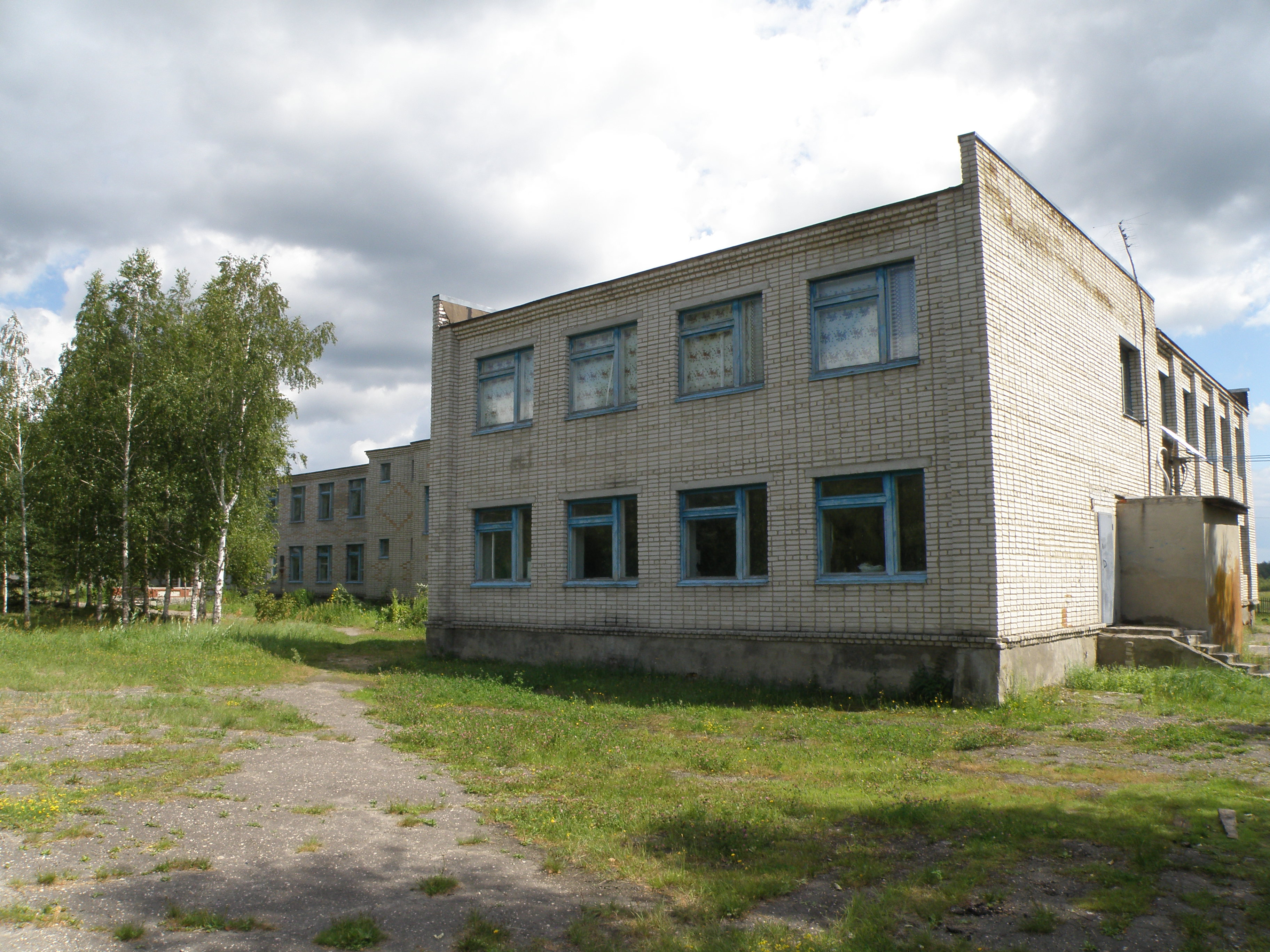 Школа в д. Мокрое